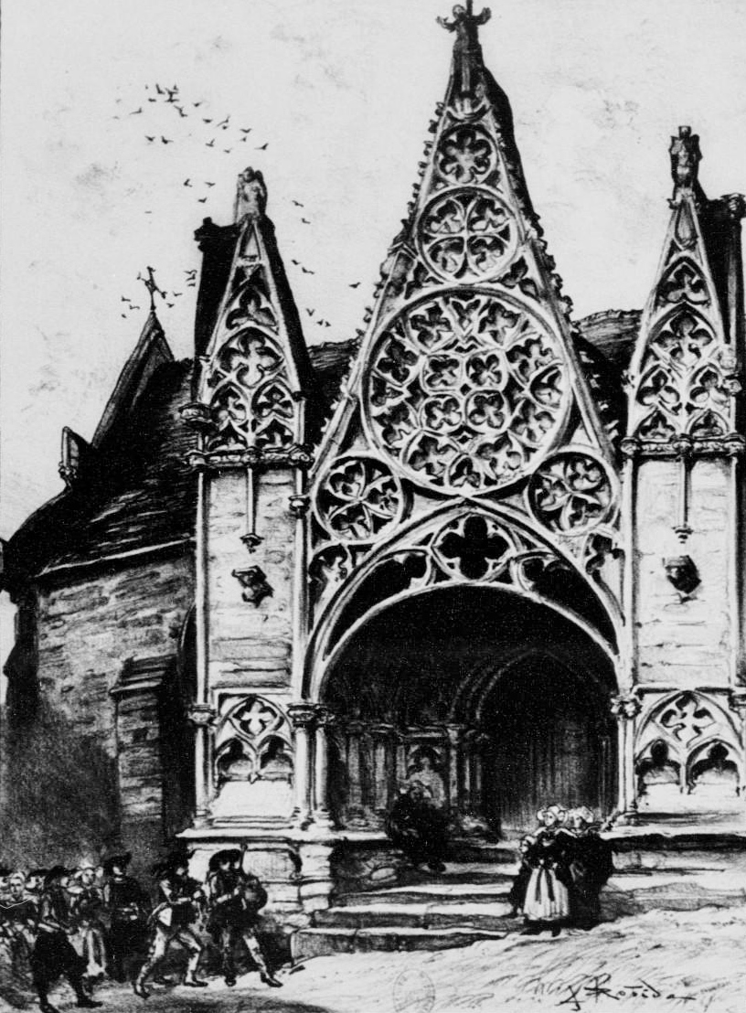 Le porche de l'église de Pont-Croix vers 1900 (lithographie d'Albert Robida publiée dans "La vieille France, Bretagne" vers 1900)